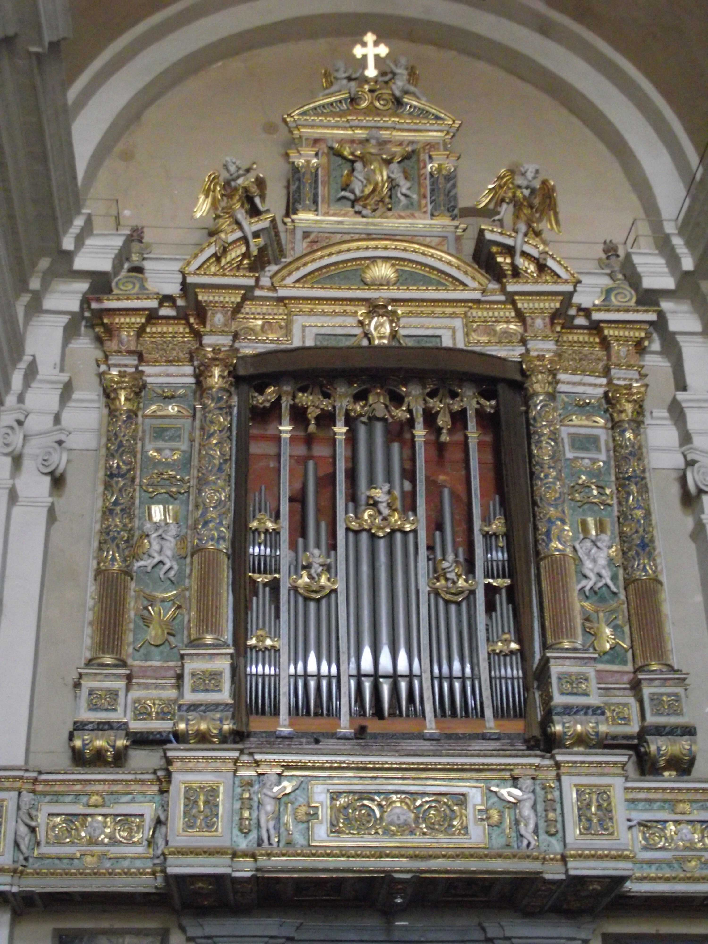 Perugia, Basilica di San Domenico